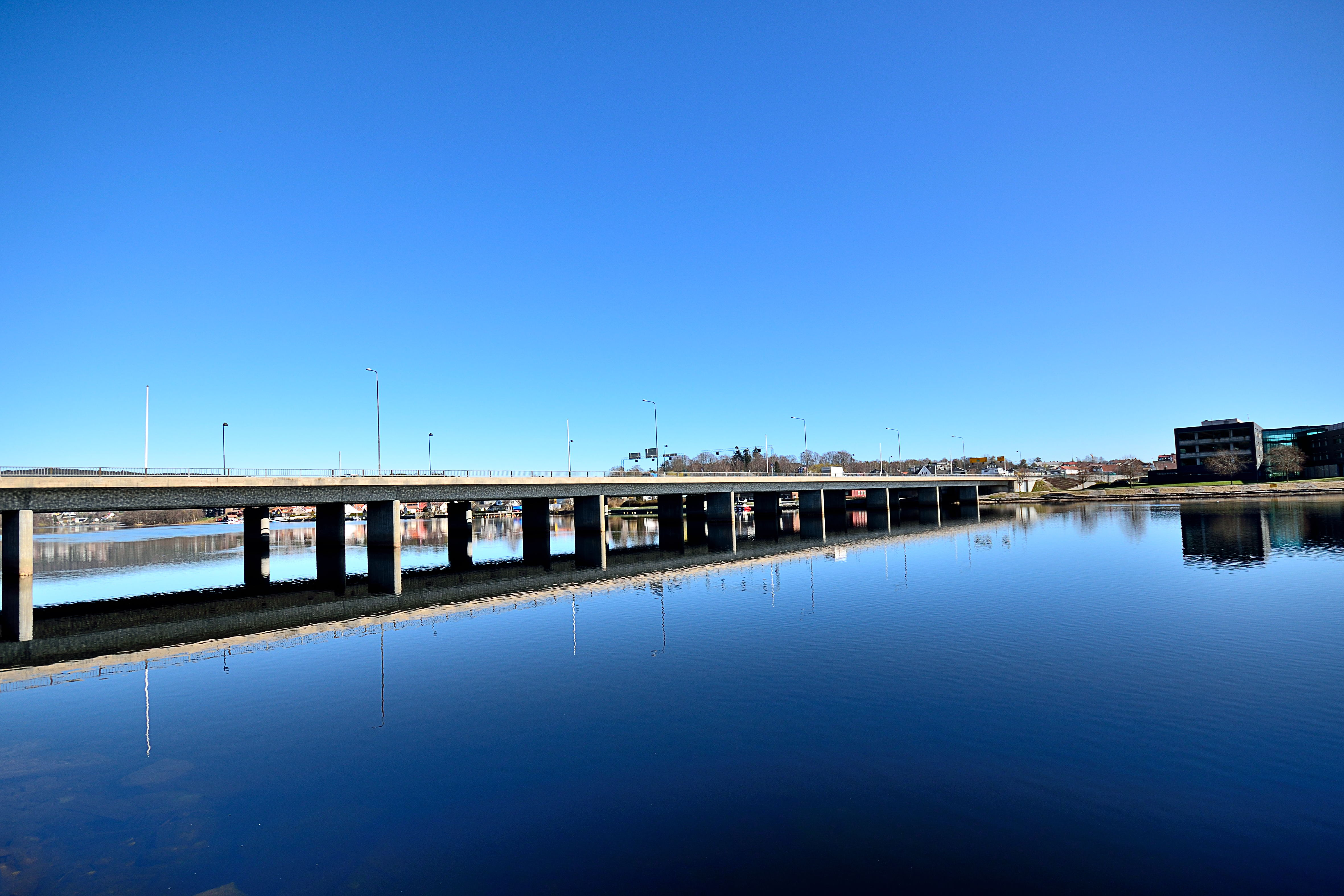 Oddenesbroa sett fra vestsiden av Otra.